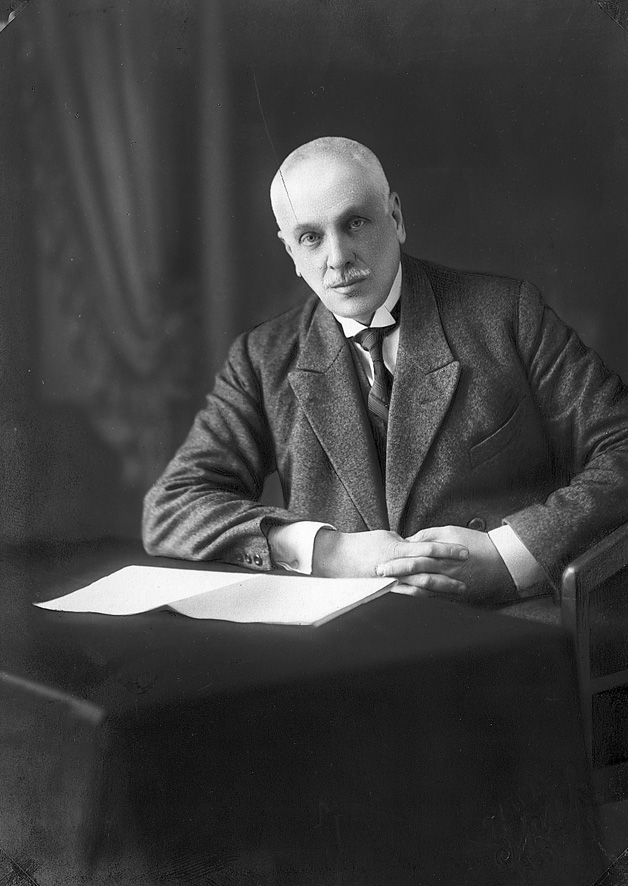 Русский представитель в королевстве сербов, хорватов и словенцев С.Н. Палеолог